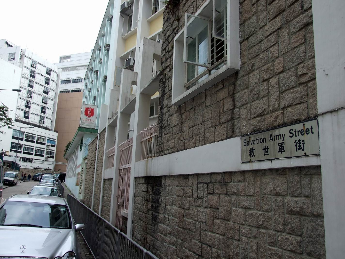 救世軍街